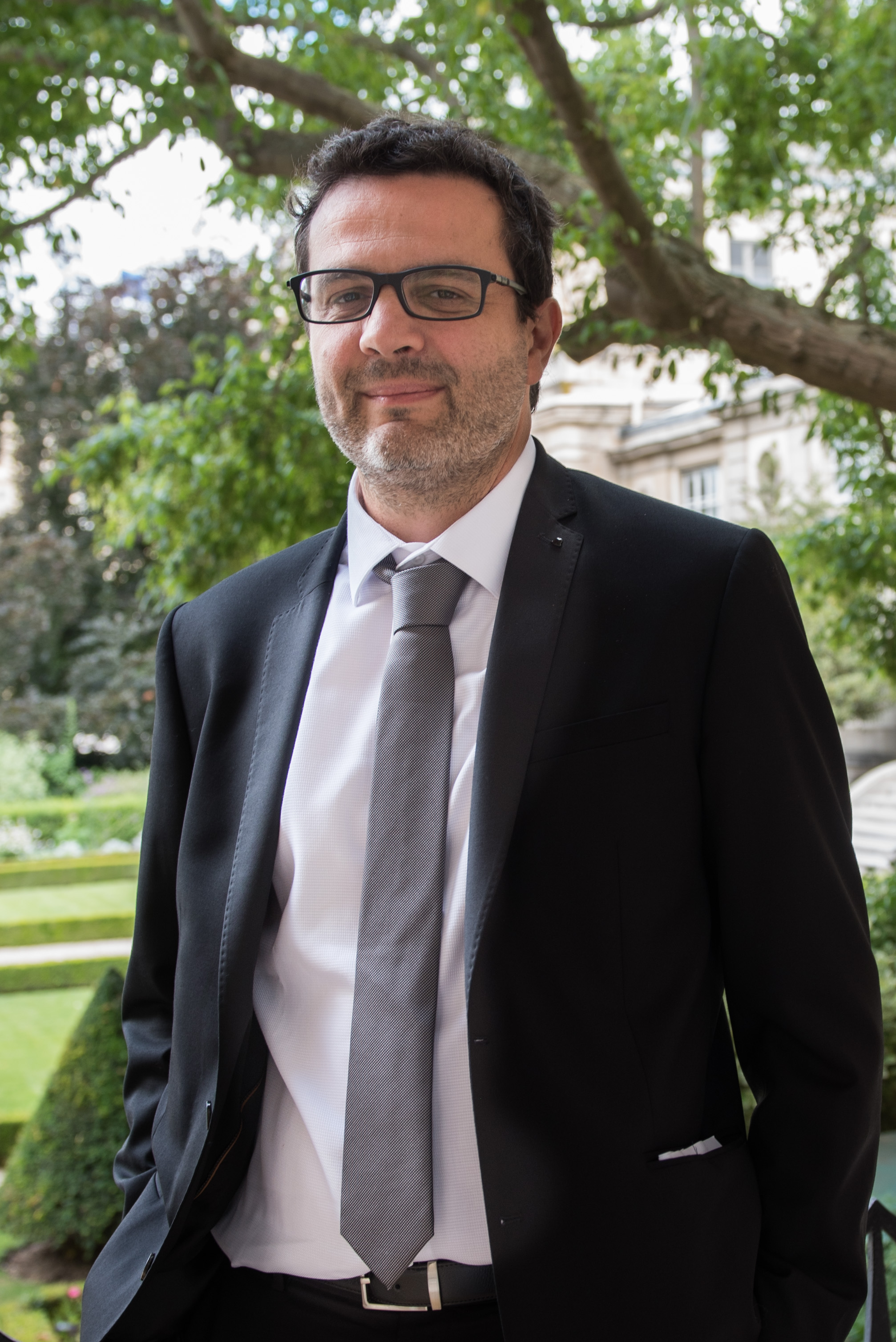 Philippe Chassaing dans le jardin des Quatre colonnes du palais Bourbon en 2017.